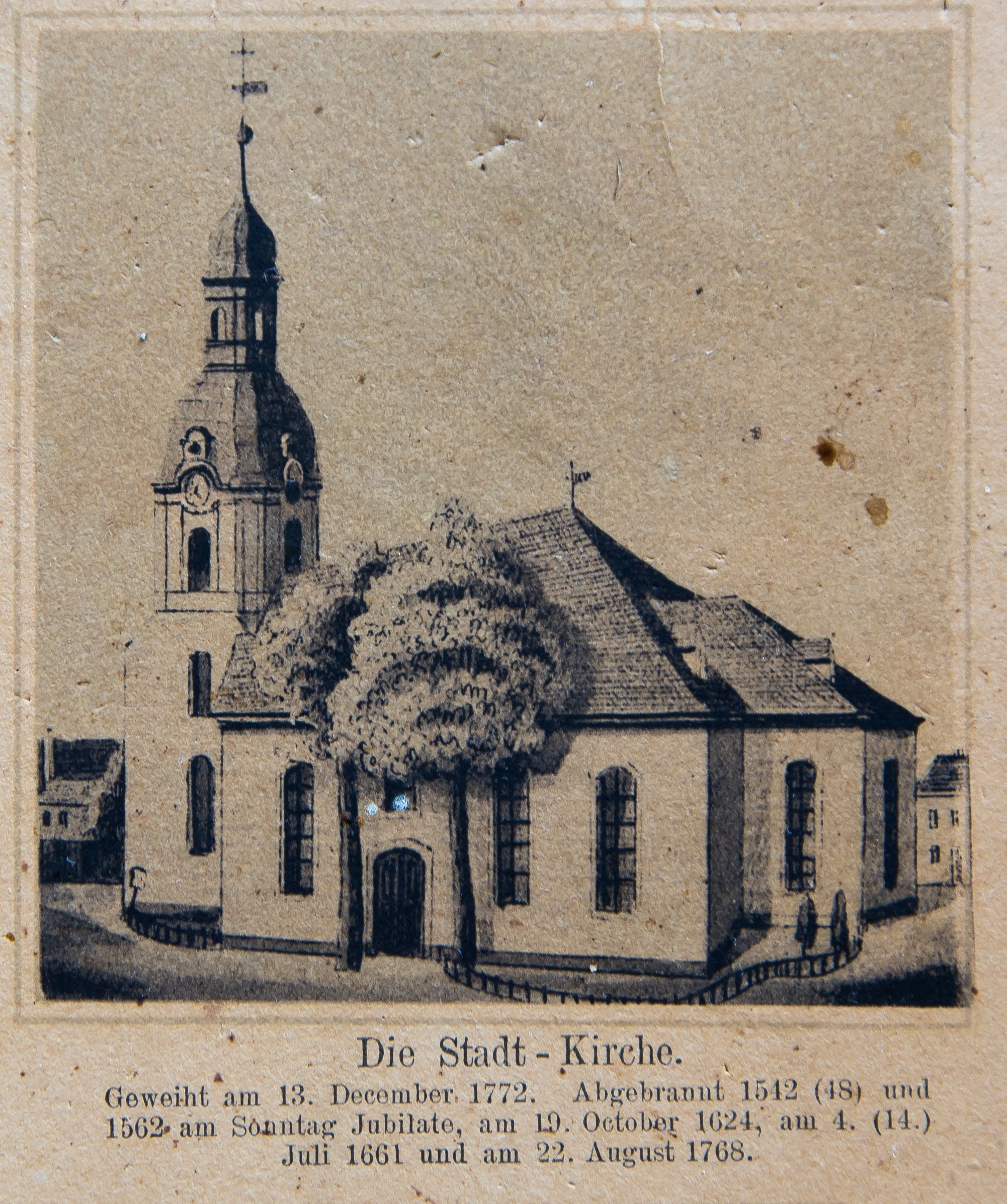 Ruhland, Kirchplatz (ohne Hausnr.), Stadtkirche, 1890